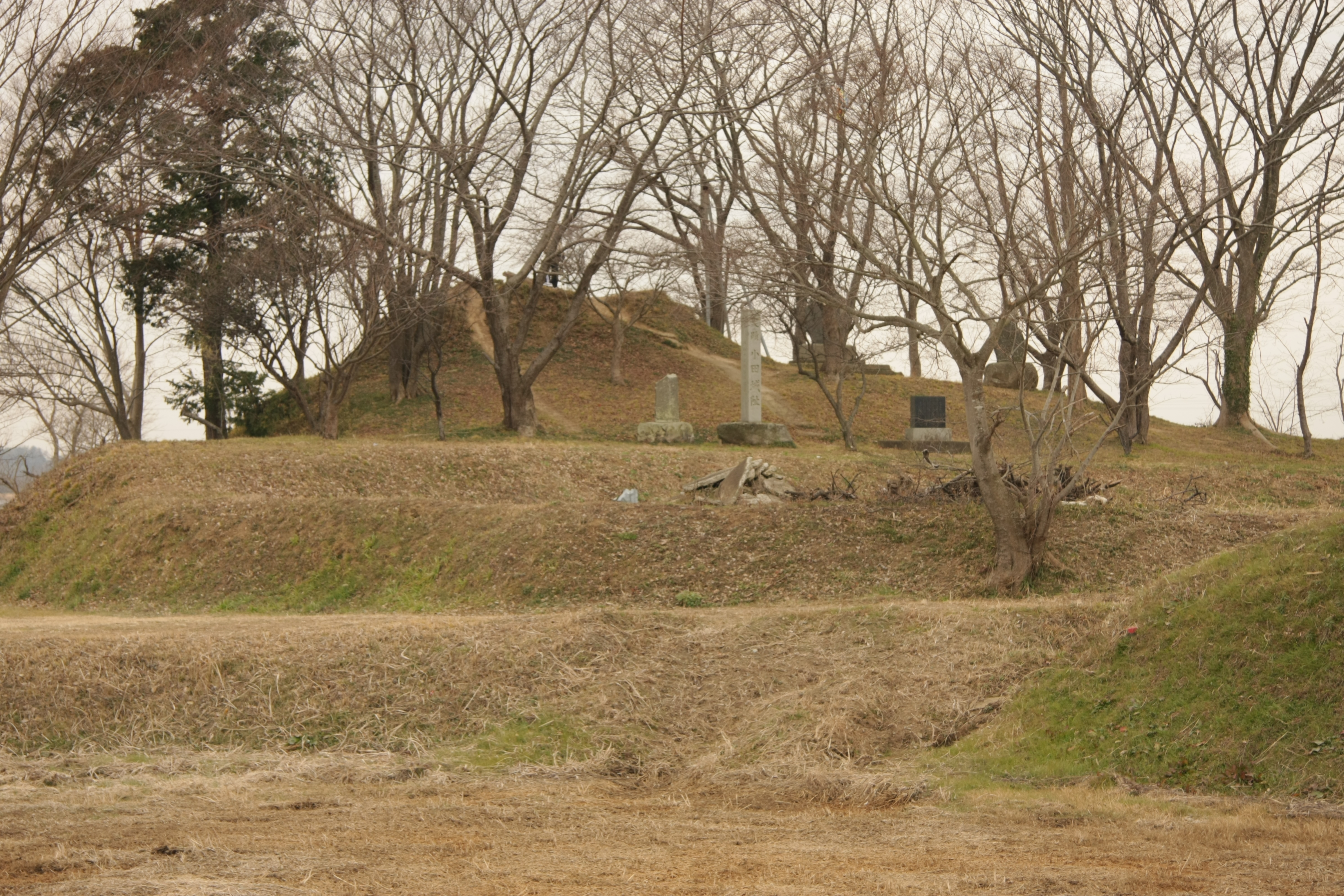 小田城（つくば市）の涼台（櫓台）